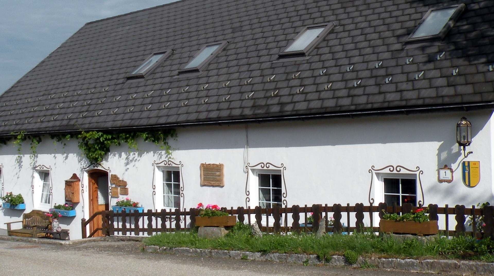 Ehemaliger Pfarrhof der Pfarre Altenburg bei Windhaag, heute in Privatbesitz